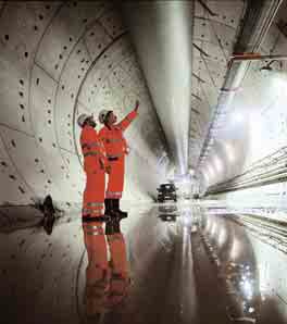 Katzenberg tunnel during construction